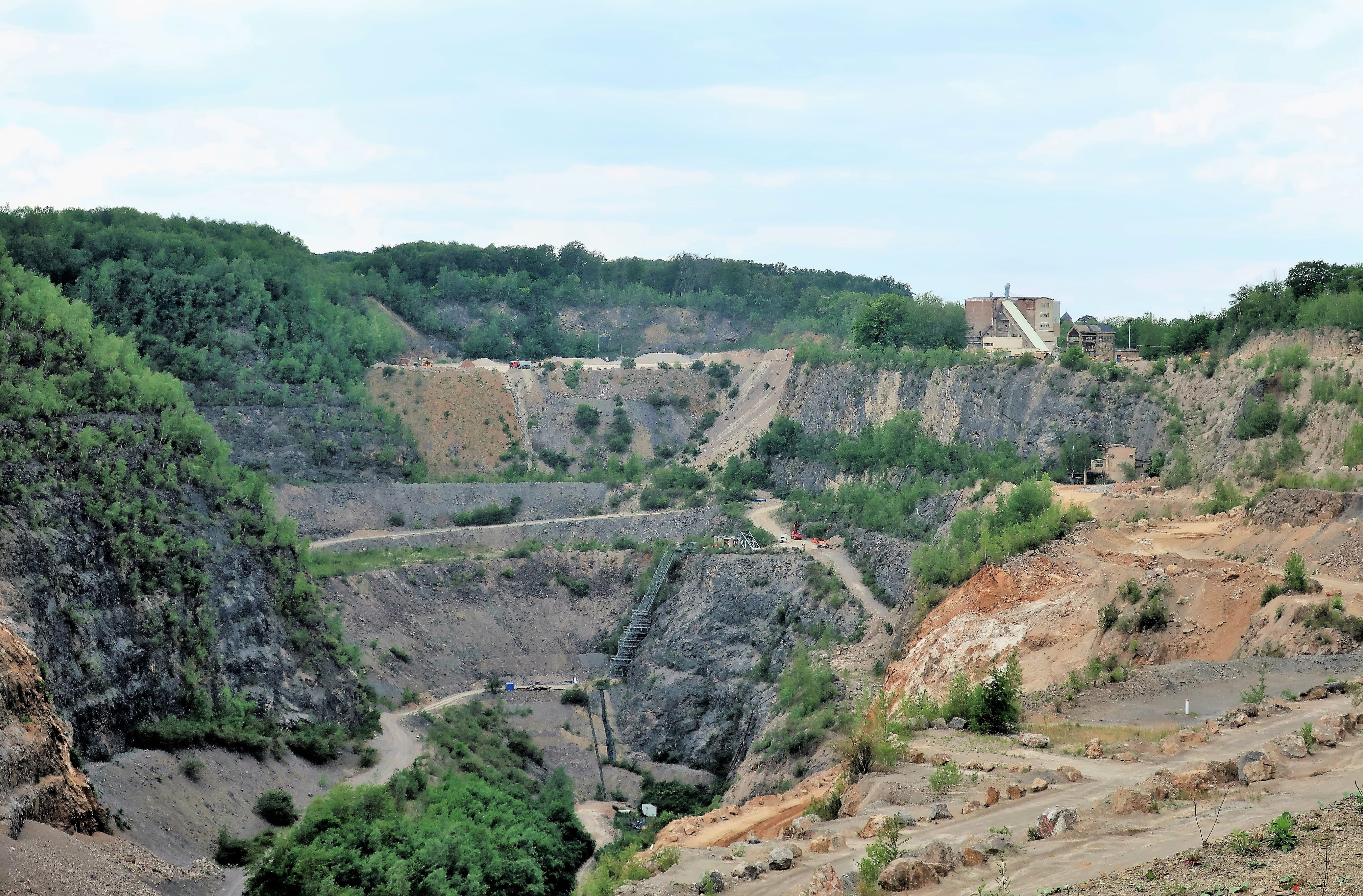 Steinbruch Donnerkuhle der Rheinkalk GmbH (Lhoist-Gruppe) in Hagen. Blick vom östlichen Aussichtspunkt nach Westen auf die Ennepe-Überschiebung.